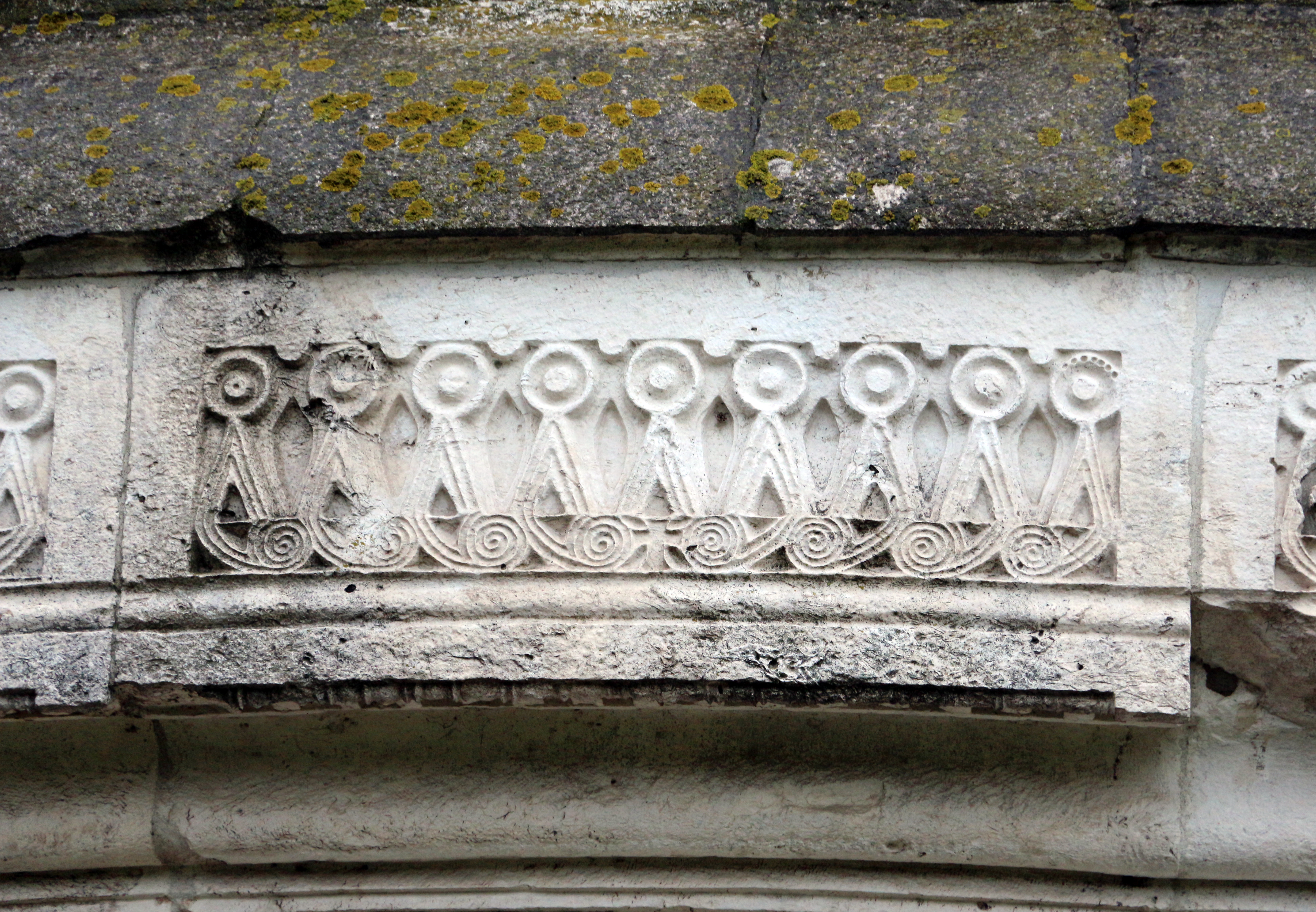 Mausoleo di Teodorico This is a photo of a monument which is part of cultural heritage of Italy.